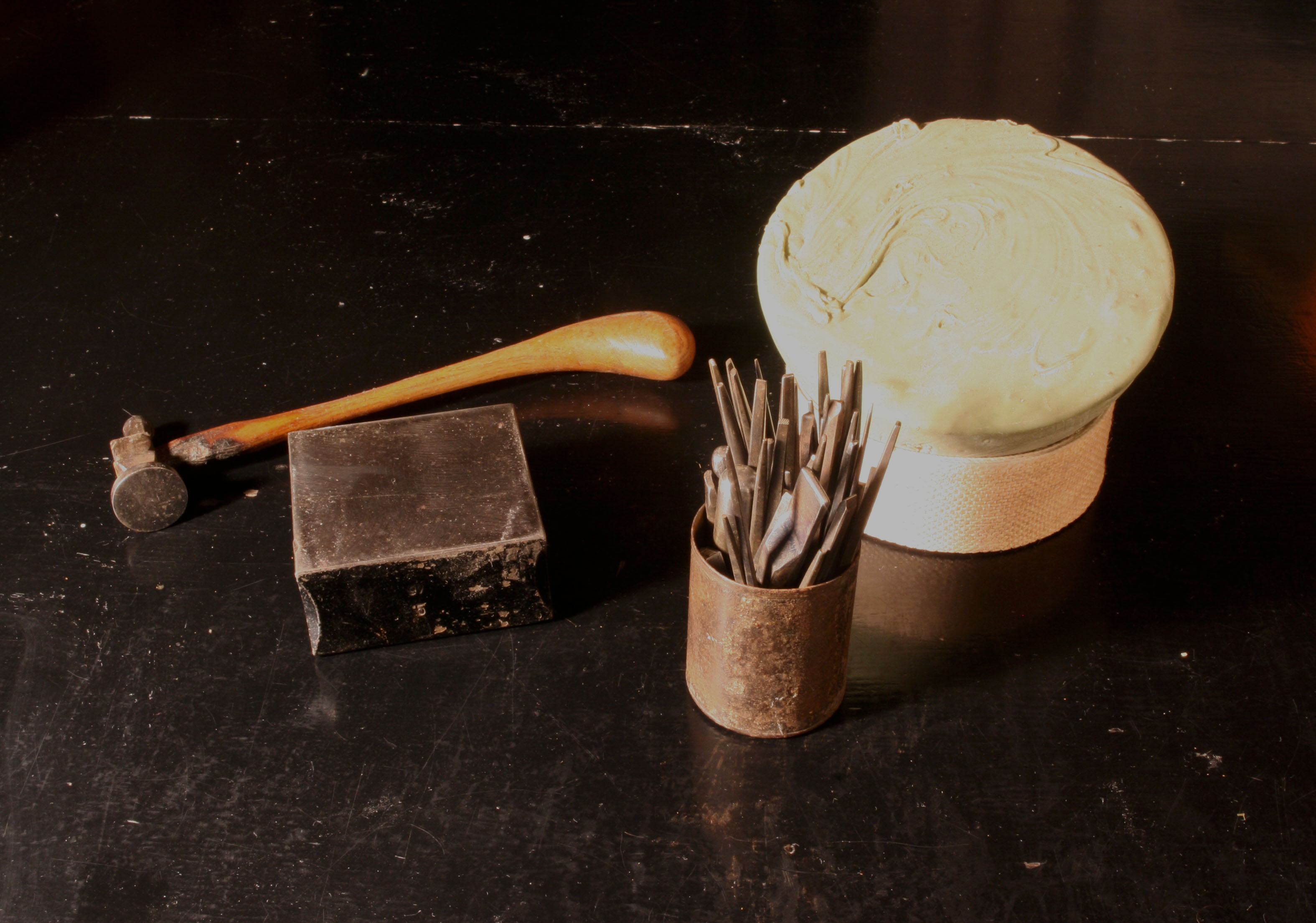 Værktøj til ciselering